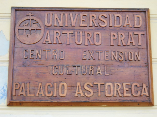 El palacio Astoreca, en Iquique, es mantenido y administrado por la Universidad Arturo Prat, funcionando como su centro de extensión.